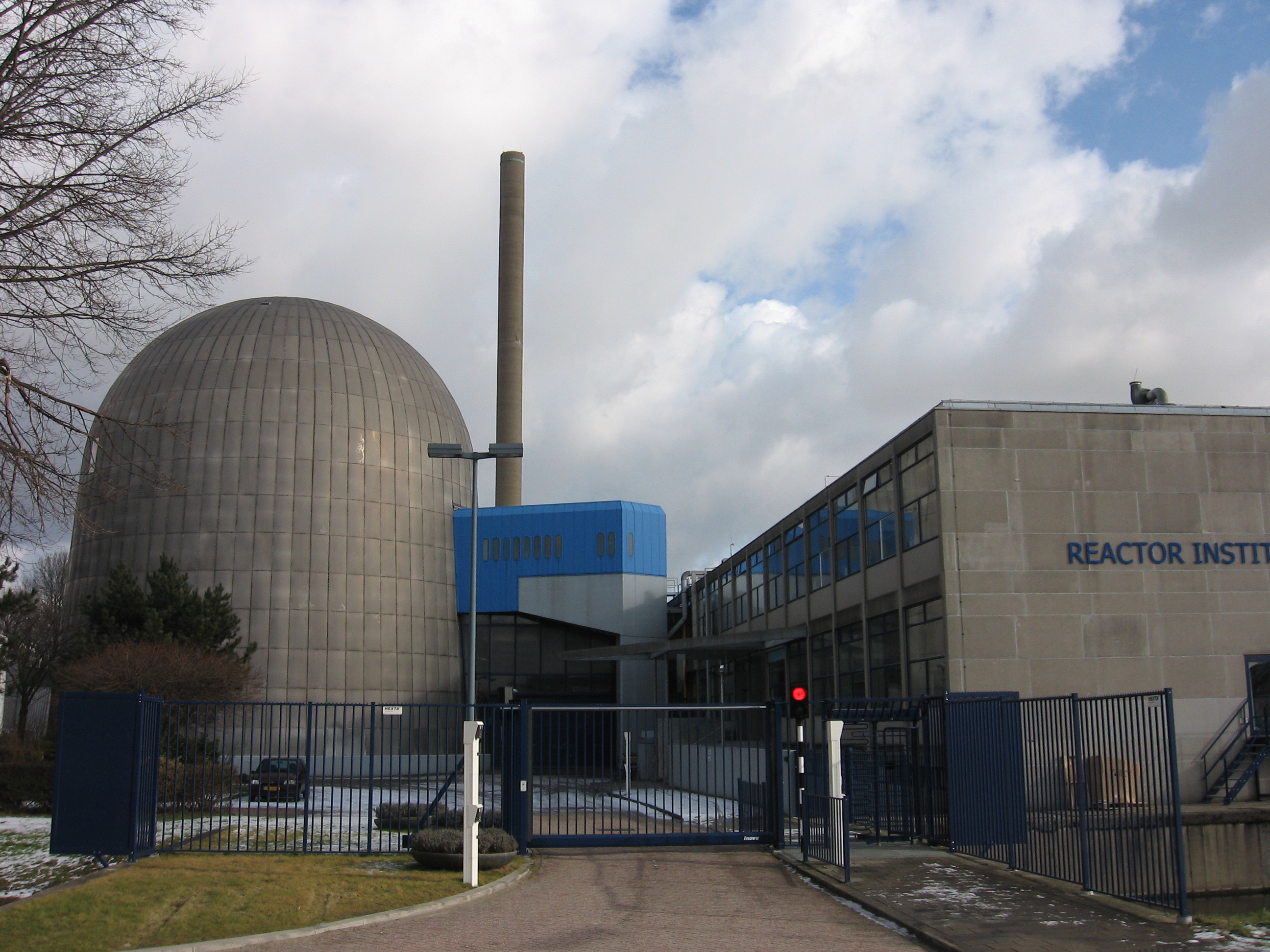 Reactor Instituut Delft. Technische Universiteit Delft